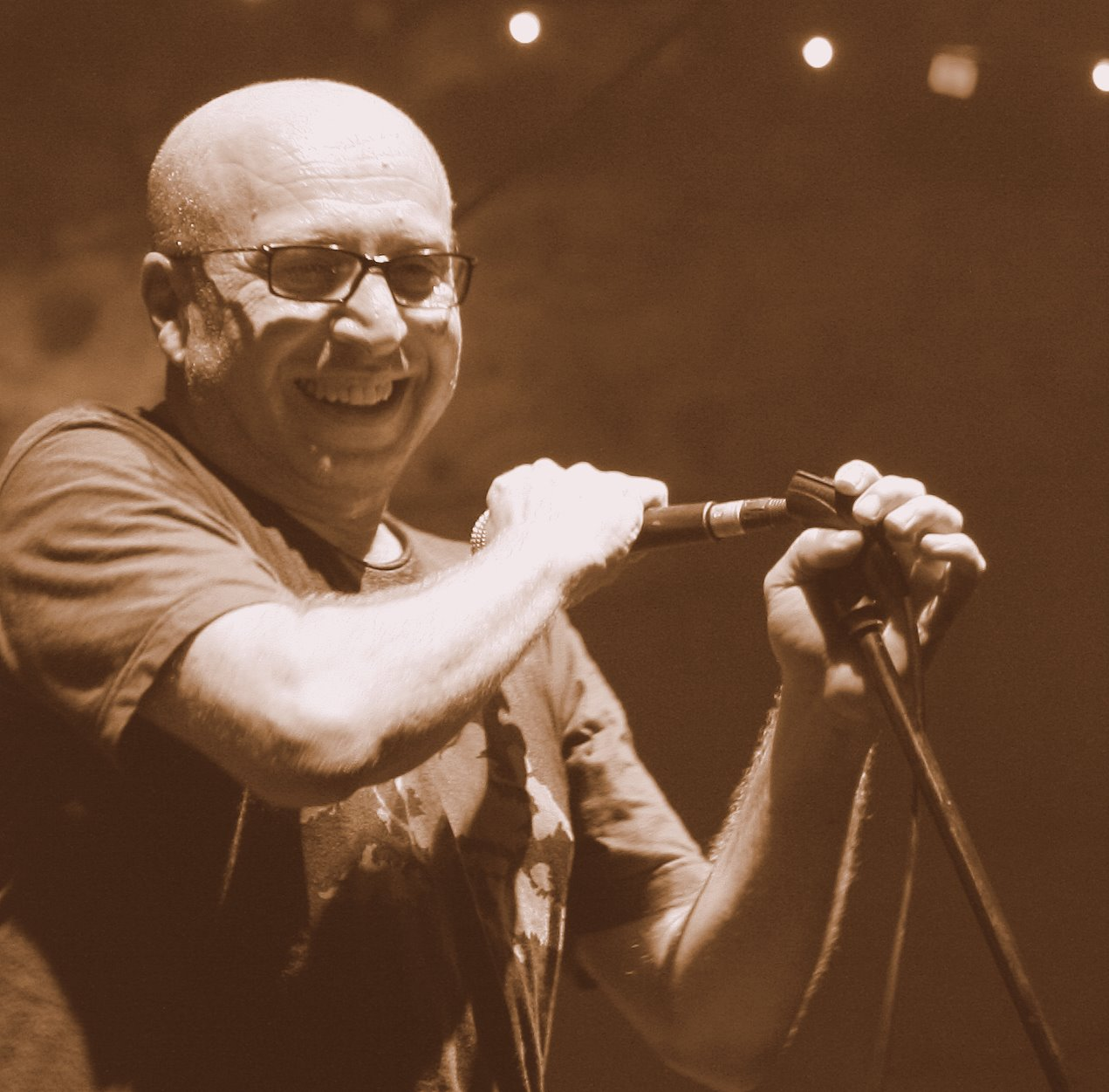 במבטא פורטיסי- תודדדהה